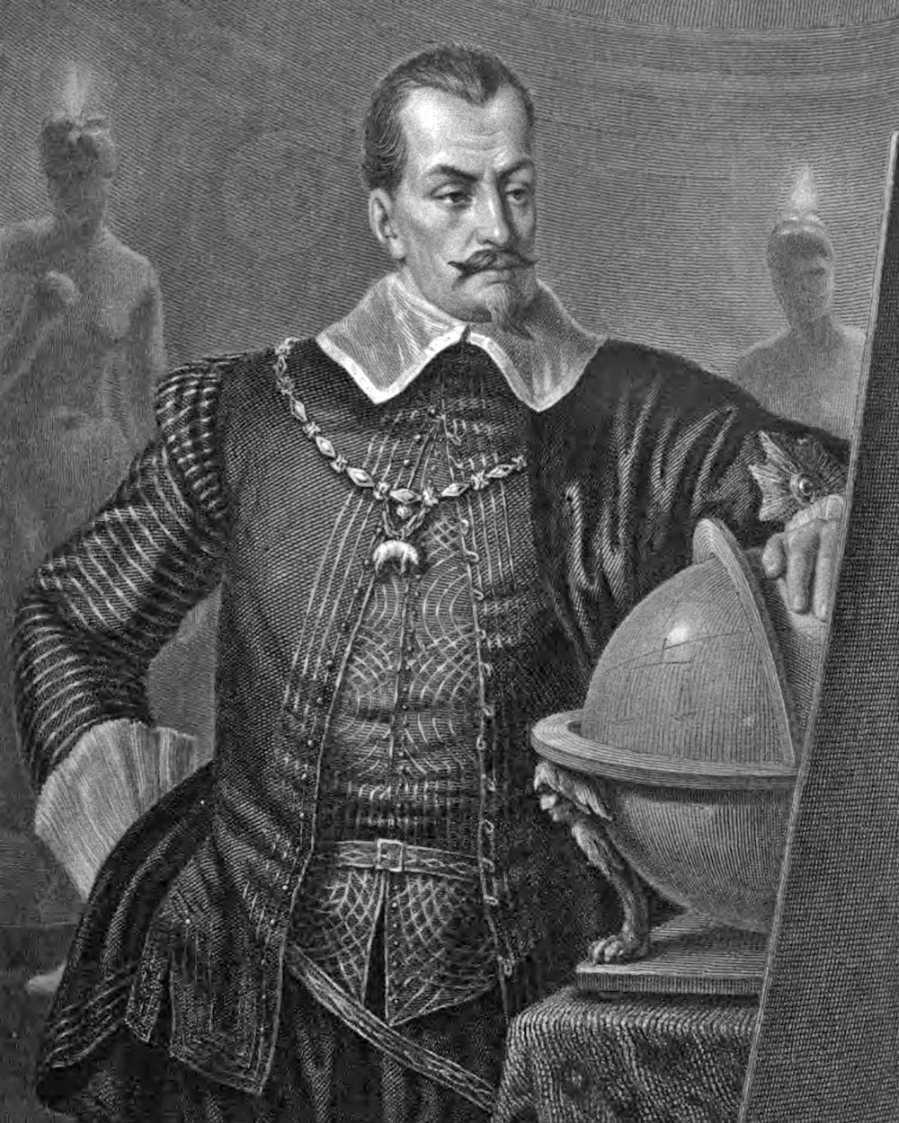 Wallenstein aus Friedrich Schillers Dramen-Trilogie Wallenstein, als Stahlstich gestochen um 1859 nach einer Zeichnung von Friedrich Pecht